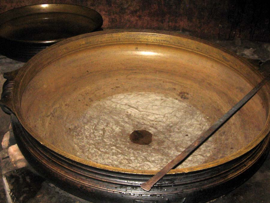 ഓട് കൊണ്ട് നിർമ്മിച്ച ഉരുളി, വാർപ്പ് എന്നും പറയപ്പെടുന്നു